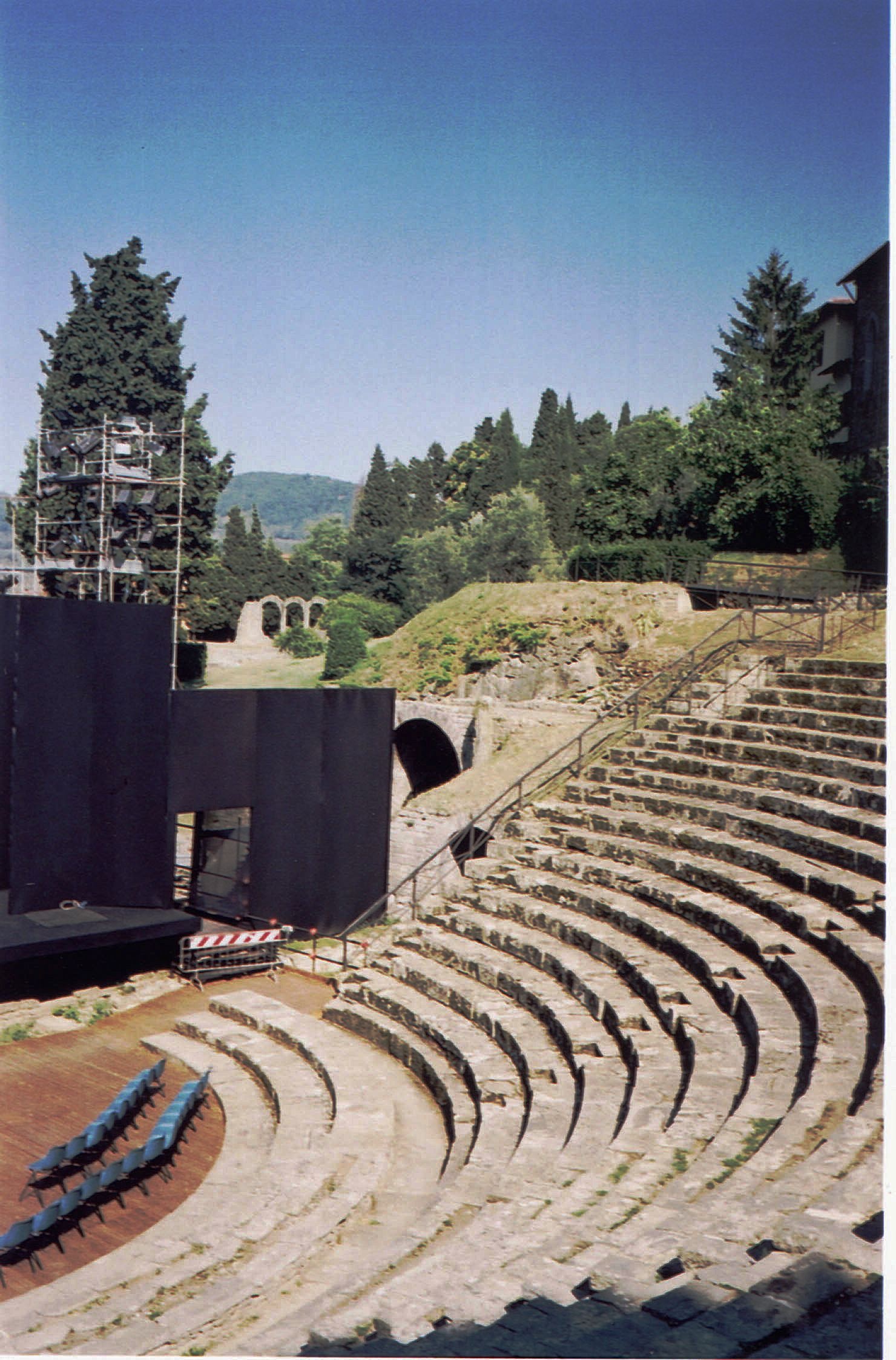 Teatro Romano a Fiesole (area archeologica), Toscana, Italia. È ancora usato come teatro.